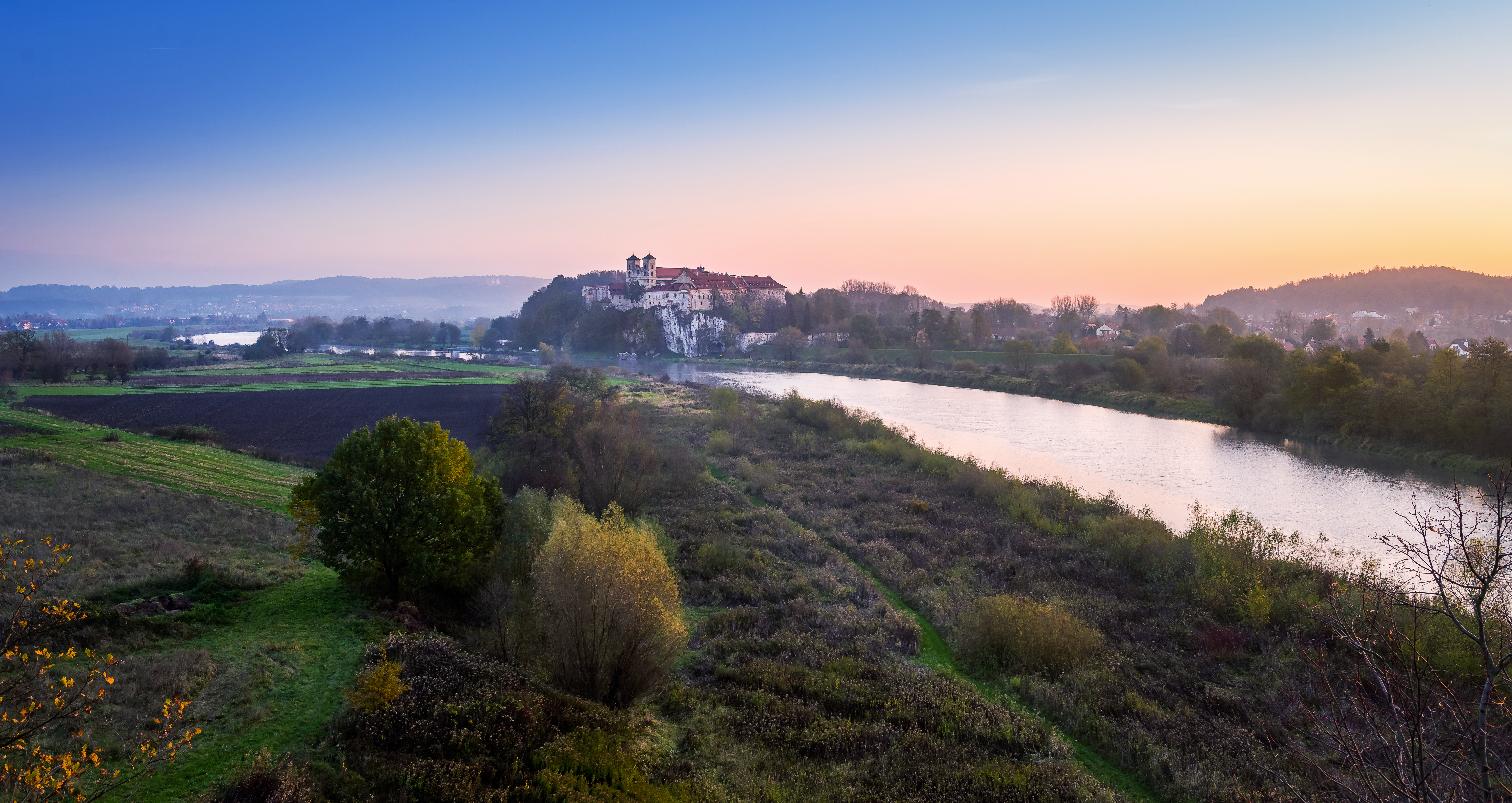 Park krajobrazowy Bielańsko-Tyniecki Park Krajobrazowy.